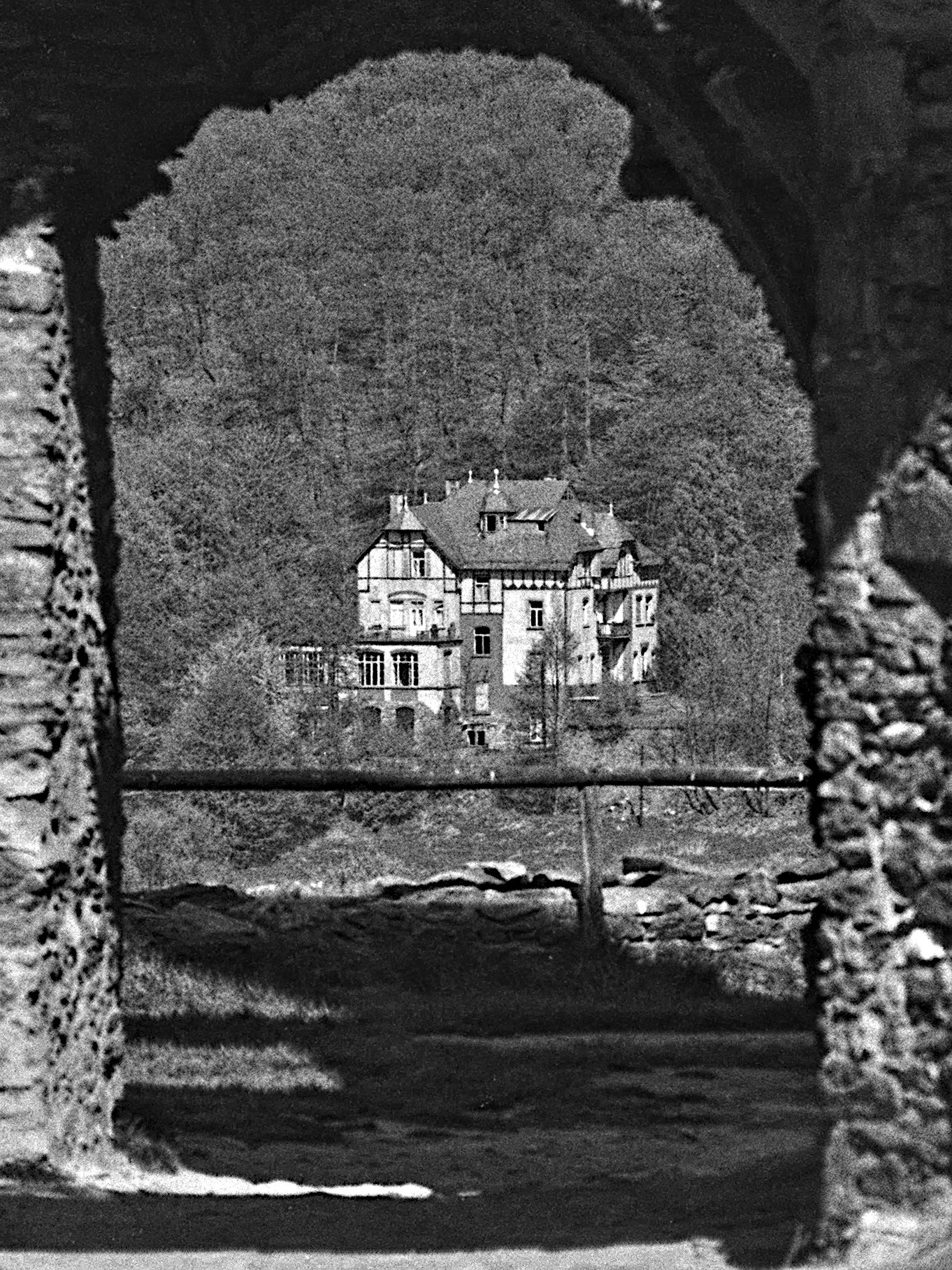 Gebäude der Taunusschule Gymnasium Königstein am Klärchenweg, benutzt von 1945 - 1962.